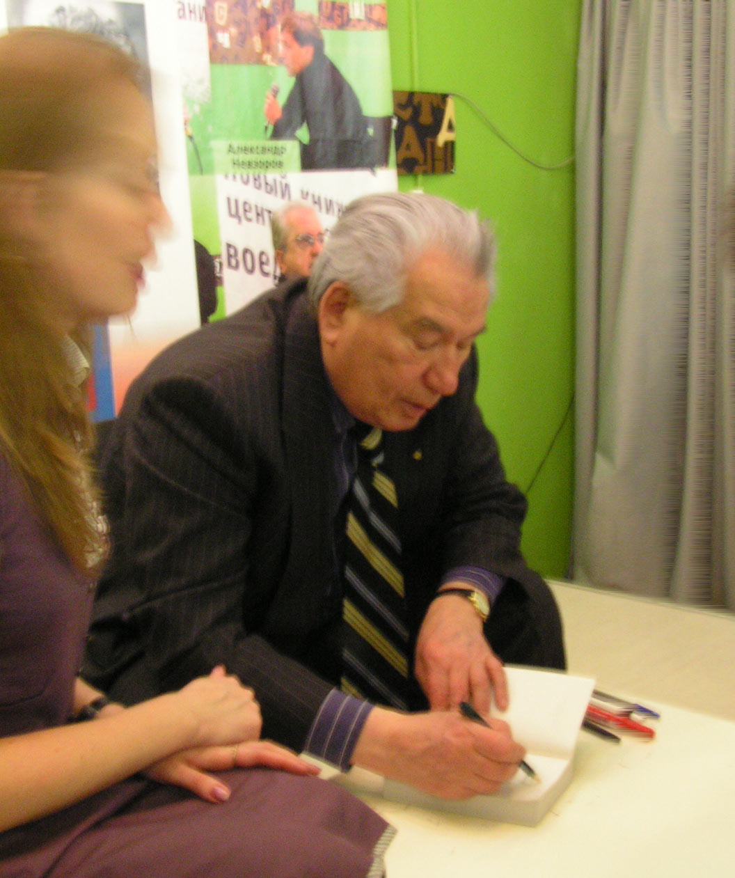 Чингиз Айтматов на встрече с читателями в Санкт-Петербурге в книжном магазине «Буквоед» на площади Восстания